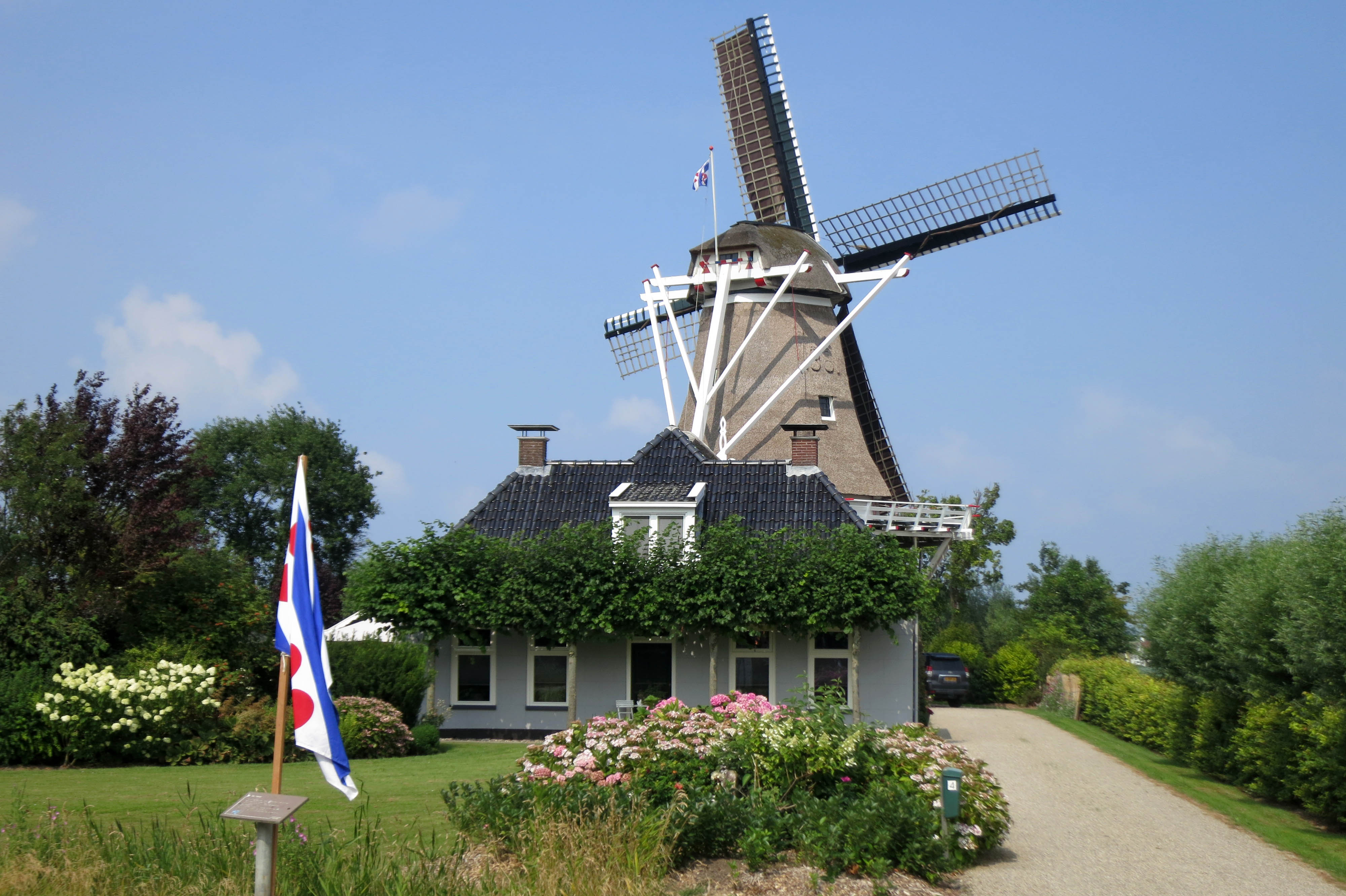 Moddergat (NL)